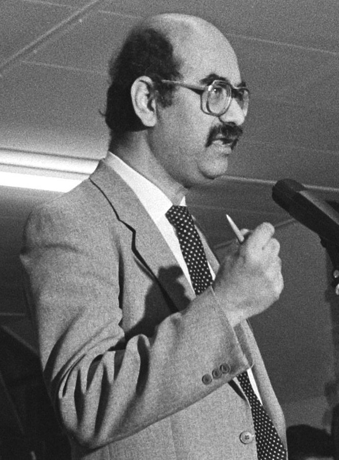 Collectie / Archief : Fotocollectie Anefo Reportage / Serie : Congres Raad voor de Bevrijding van Suriname in Rotterdam Beschrijving : mr. Janki (staand), dr. Sedny (l) Datum : 15 maart 1986 Locatie : Rotterdam, Zuid-Holland Trefwoorden : conferenties Fotograaf : Croes, Rob C. / Anefo Auteursrechthebbende : Nationaal Archief Materiaalsoort : Negatief (zwart/wit) Nummer archiefinventaris : bekijk toegang 2.24.01.05 Bestanddeelnummer : 933-5956